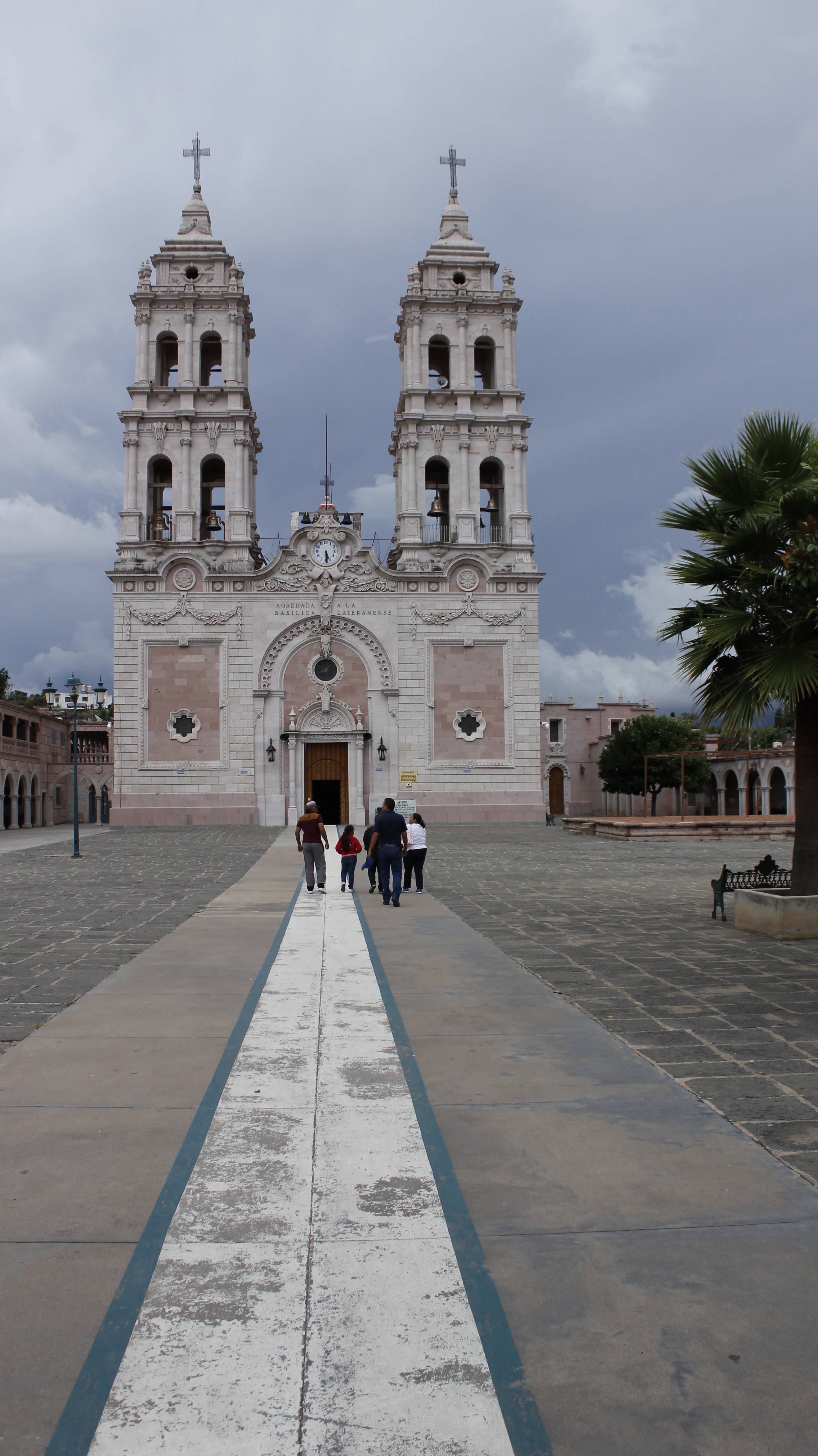 fachada del templo del señor de los rayos